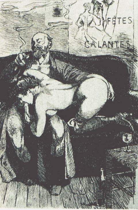 Dessins de Martin van Maële. Illustration d'un poème de Paul Verlaine. 1907.